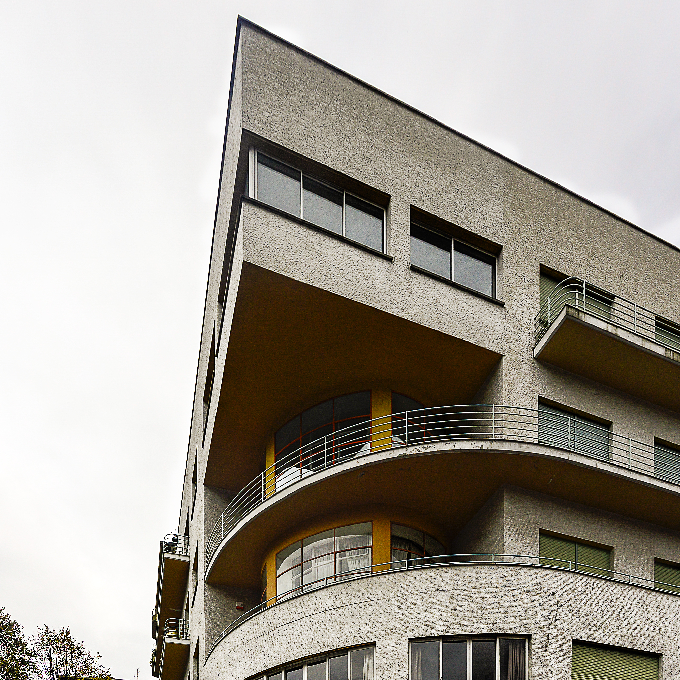 Soluzione angolare del Novocomum